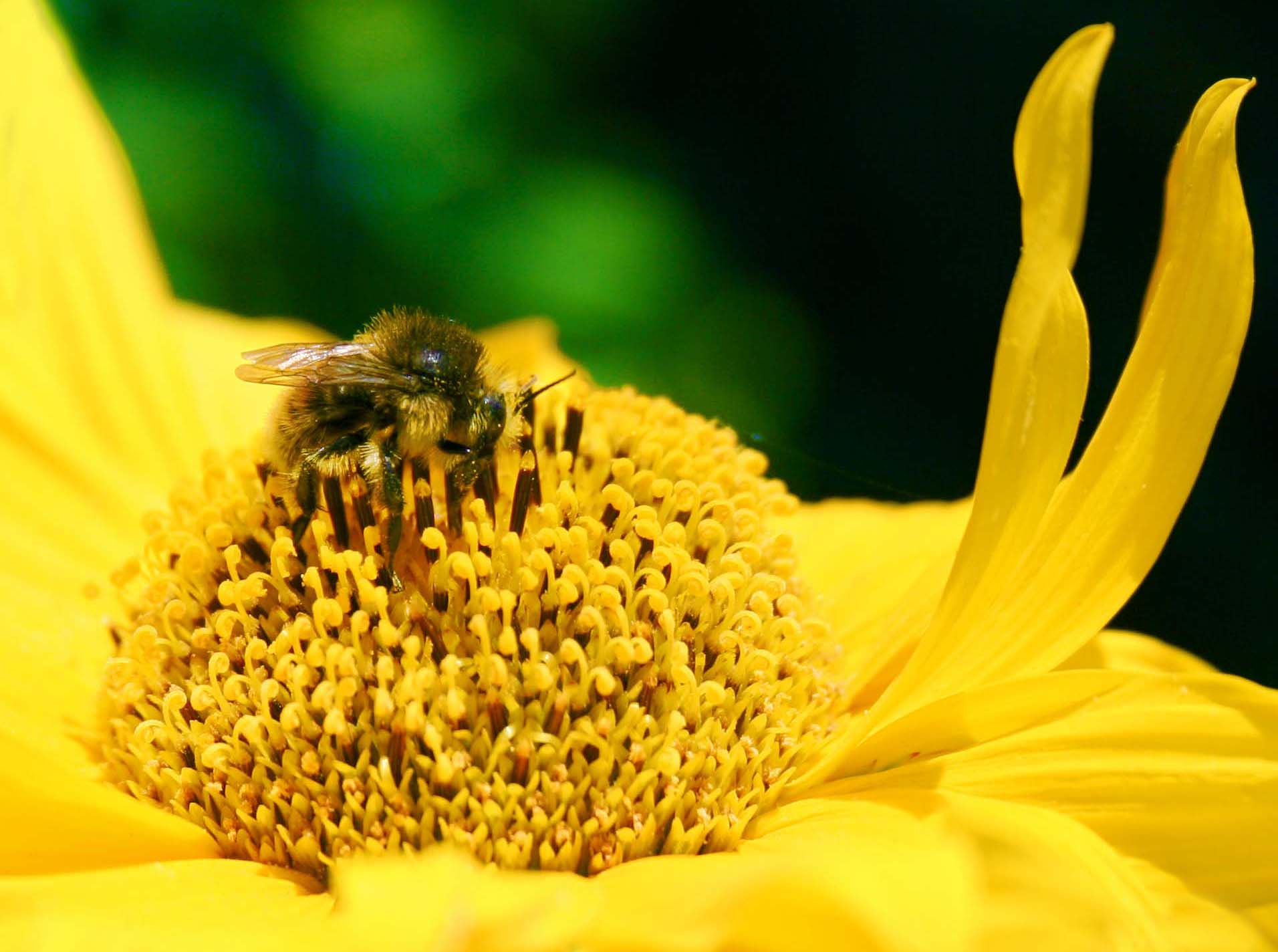 Bee macro photo - Méh közelről